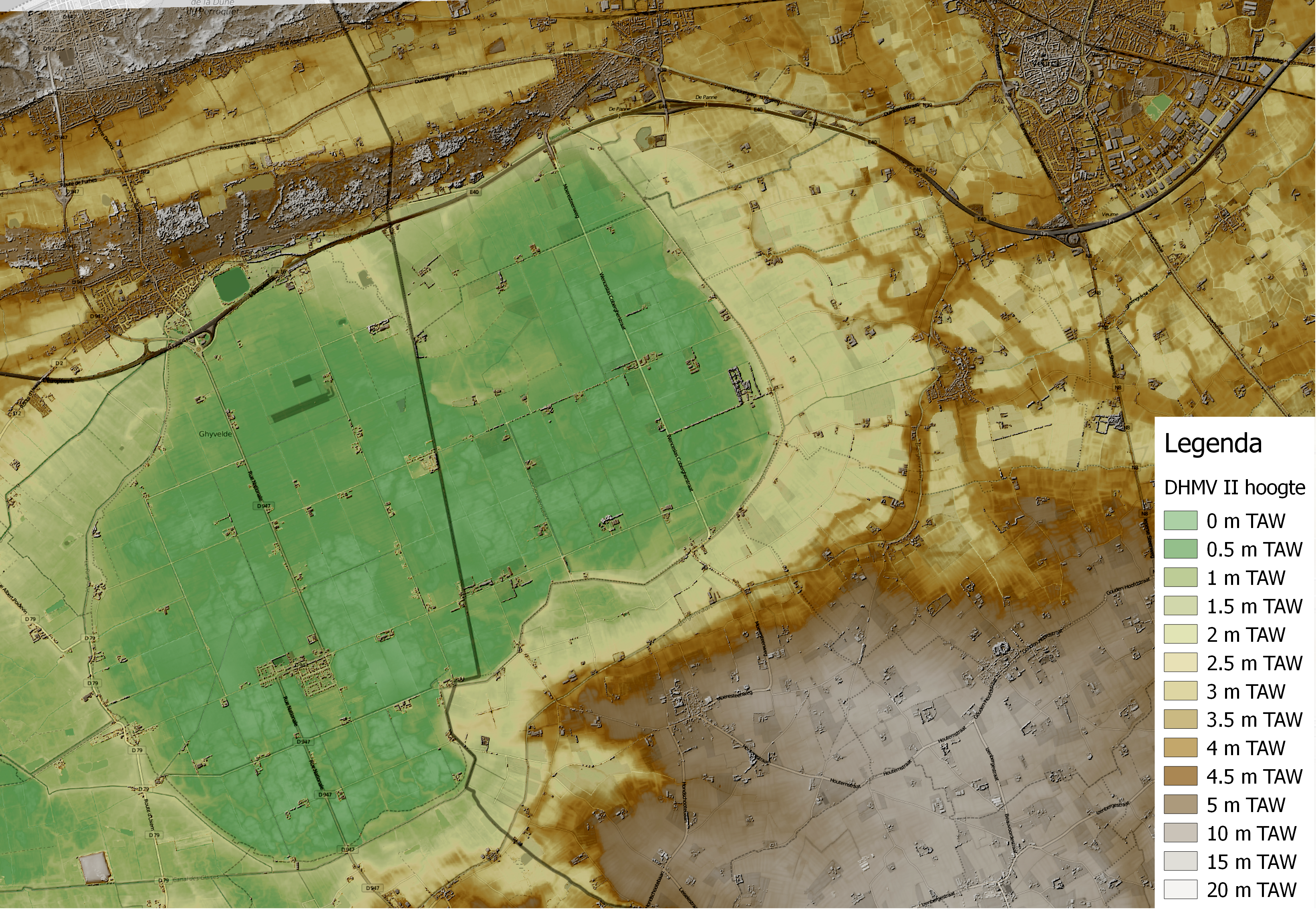 Hoogtekaart van de Moeren, België This map may be incomplete, and may contain errors. Don't rely solely on it for navigation.